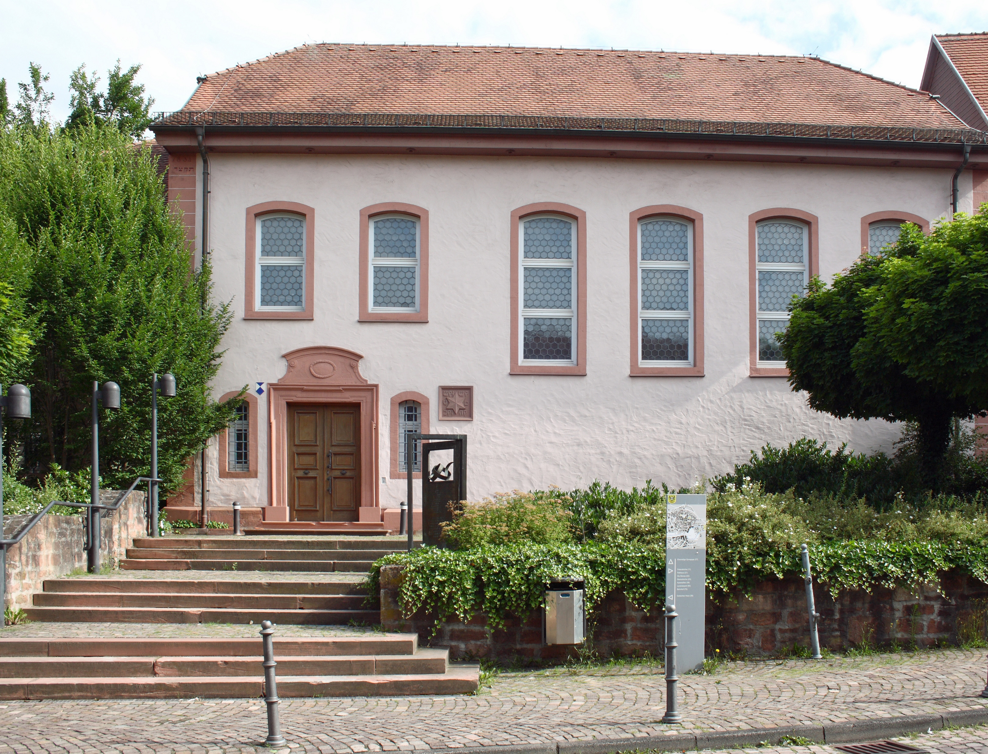 Synagoge in Gelnhausen im Main-Kinzig-kreis (Hessen)